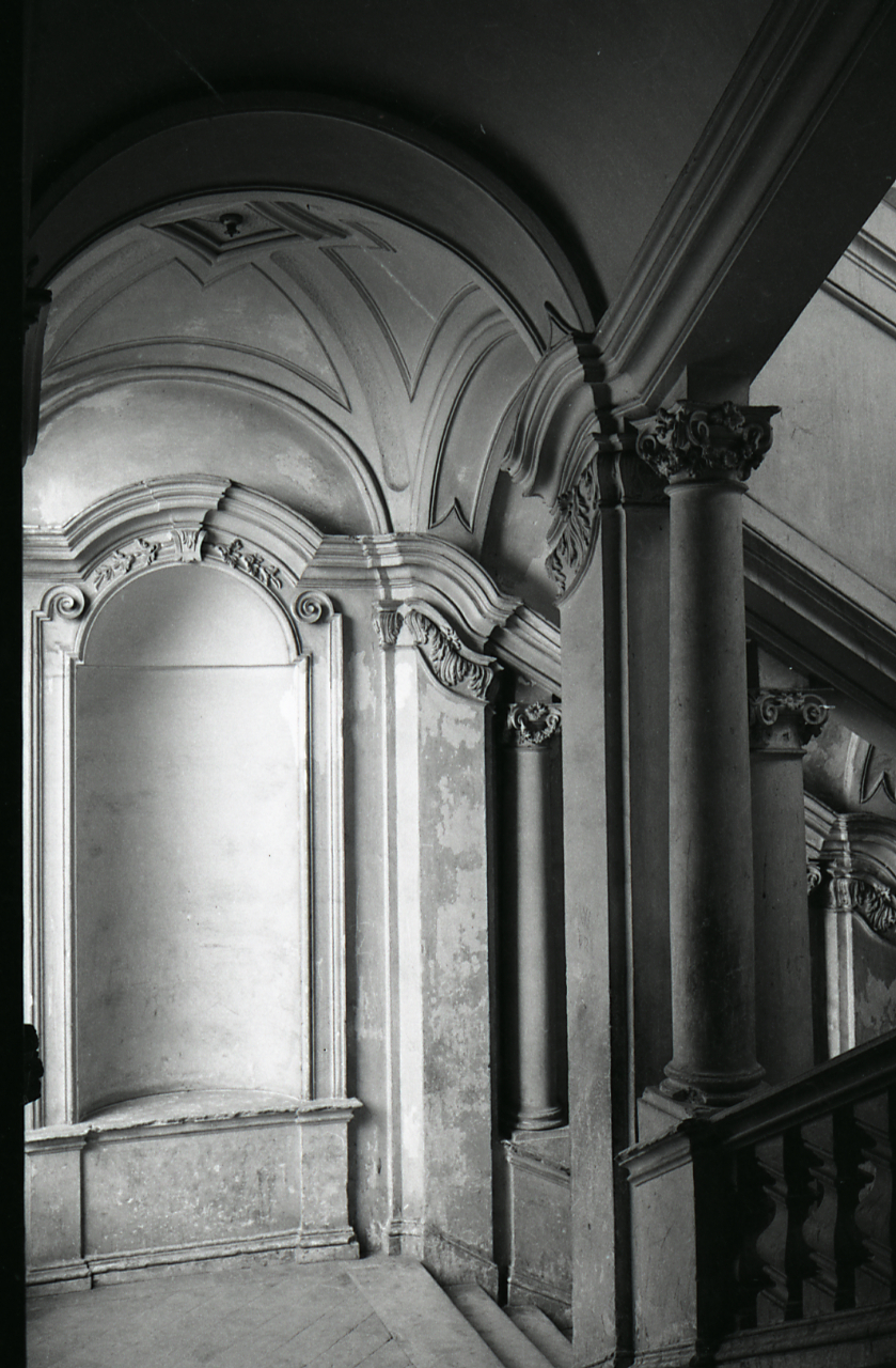 Servizio fotografico : Jesi, 1969 / Paolo Monti. - Strisce: 2, Fotogrammi complessivi: 9 : Negativo b/n, gelatina bromuro d'argento/ pellicola ; 35 mm. - ((I fotogrammi hanno una doppia numerazione. s. - Sul portanegativi: Leica M4 FP4. - Sul dorso del portanegativi Monti specifica: "Marche.". - Occasione: Documentazione per la pubblicazione: "TOURING CLUB ITALIANO, Marche, Milano, TCI, 1971". - Fonte: Agenda di Paolo Monti: Monti/ 3 aprile 1966 - 9 marzo 1971/ 12421-16823 (1966-1971), presso Archivio Paolo Monti. - Fonte: Monografia: TOURING CLUB ITALIANO, Marche, Milano, TCI, 1971 (1971). - Fonte: Agenda di Paolo Monti: Monti - Agenda 1969 (1969), presso Archivio Paolo Monti